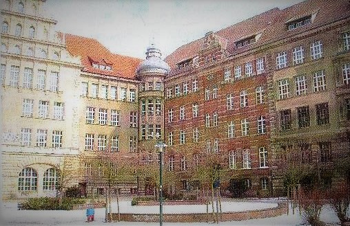 Ehemalige Neue Oberschule in Berlin-Pankow, heute andere Nutzung (2004)